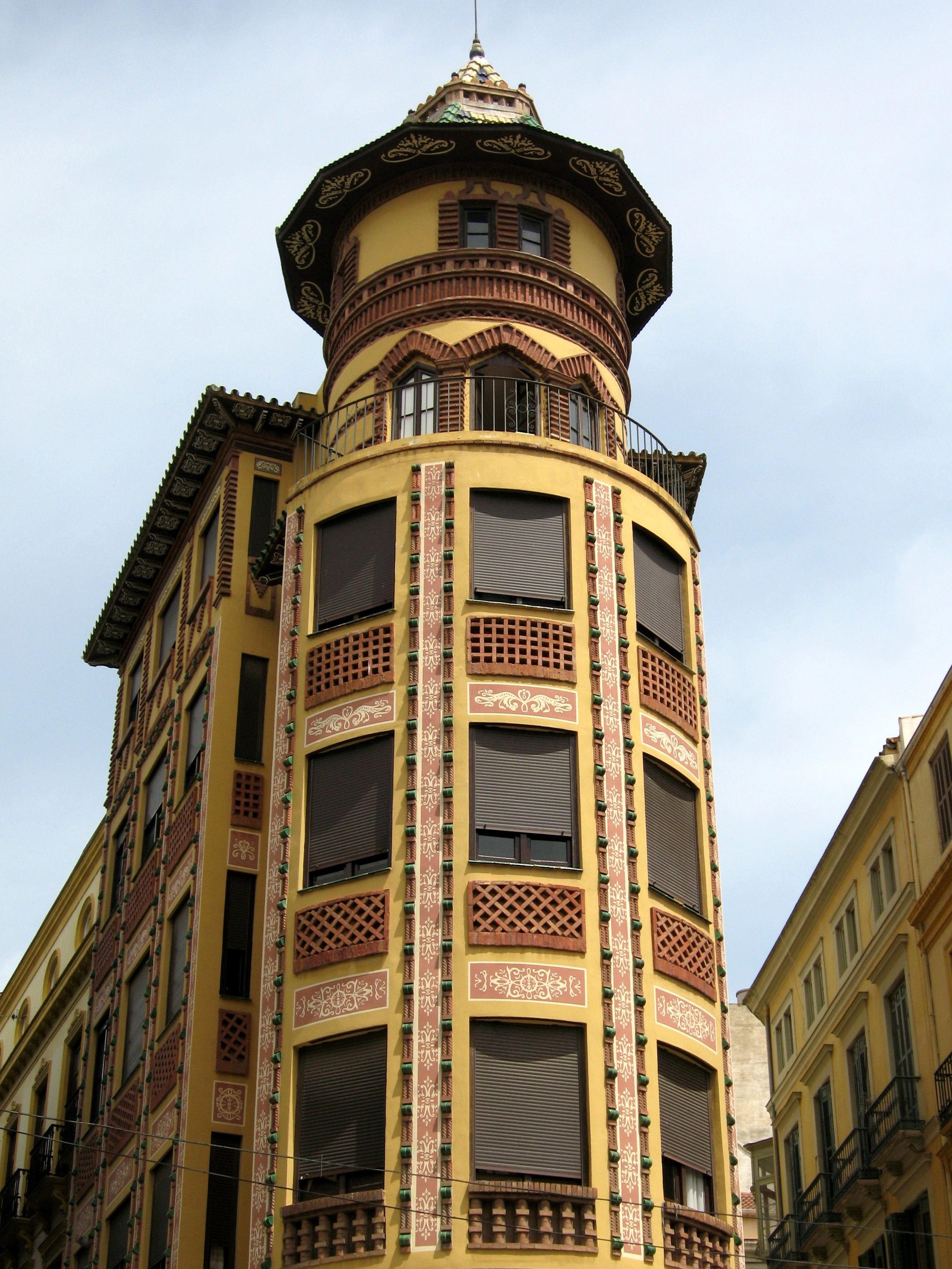 Altstadt von Málaga, Andalusien, Spanien